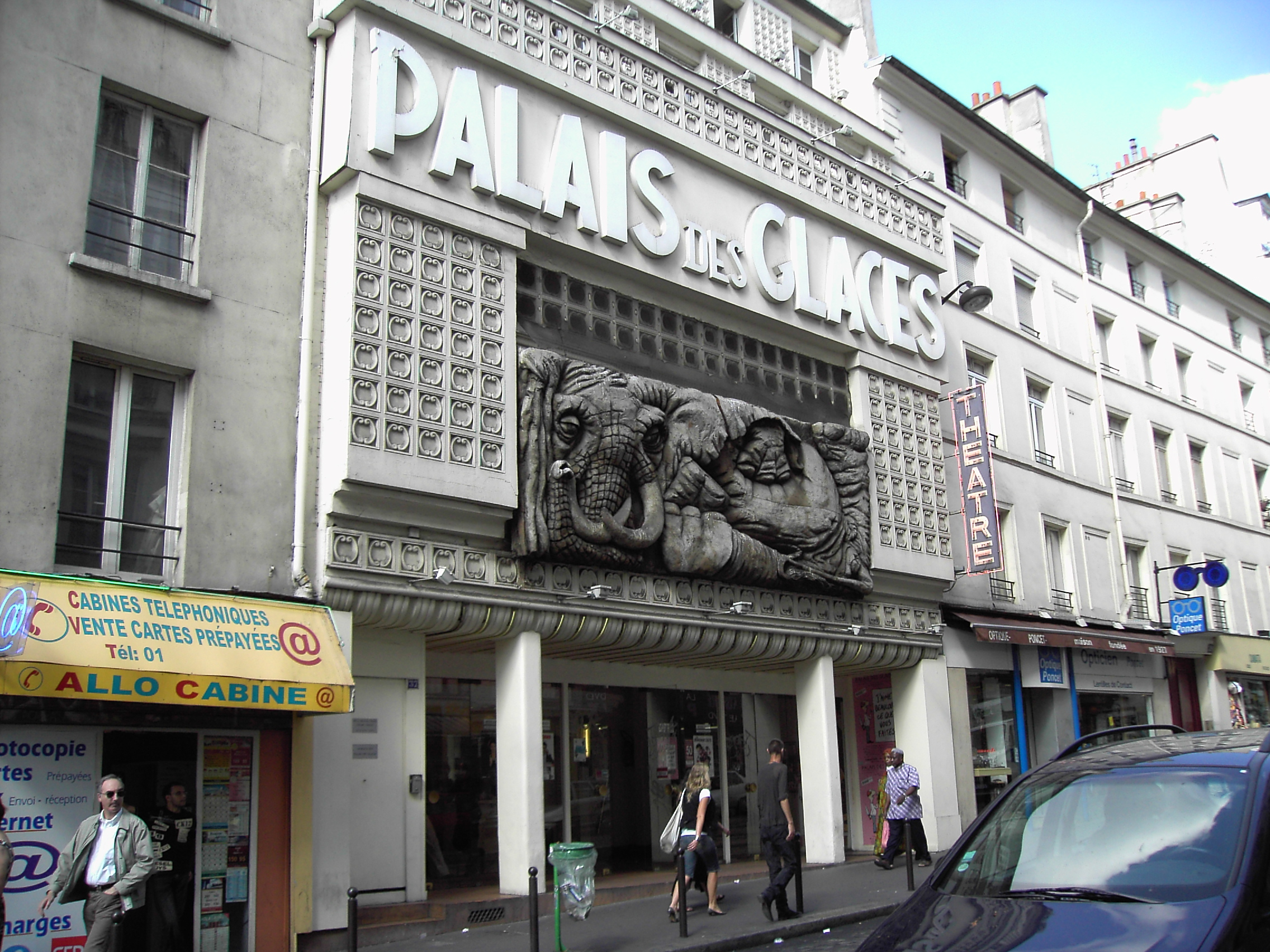 Paris, Palais des Glaces (10.me arr.) by Lalupa